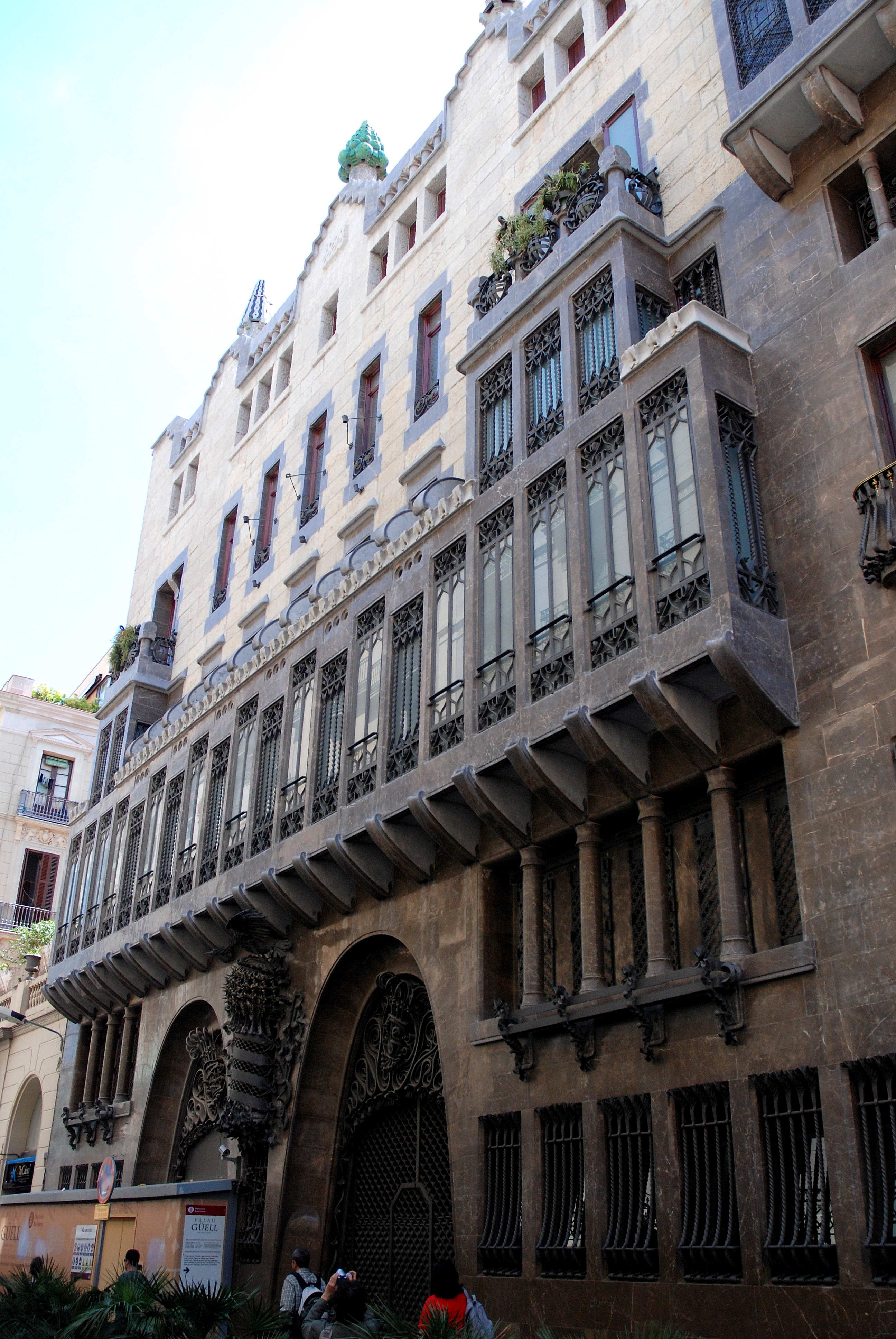 Palau Güell in Barcelona